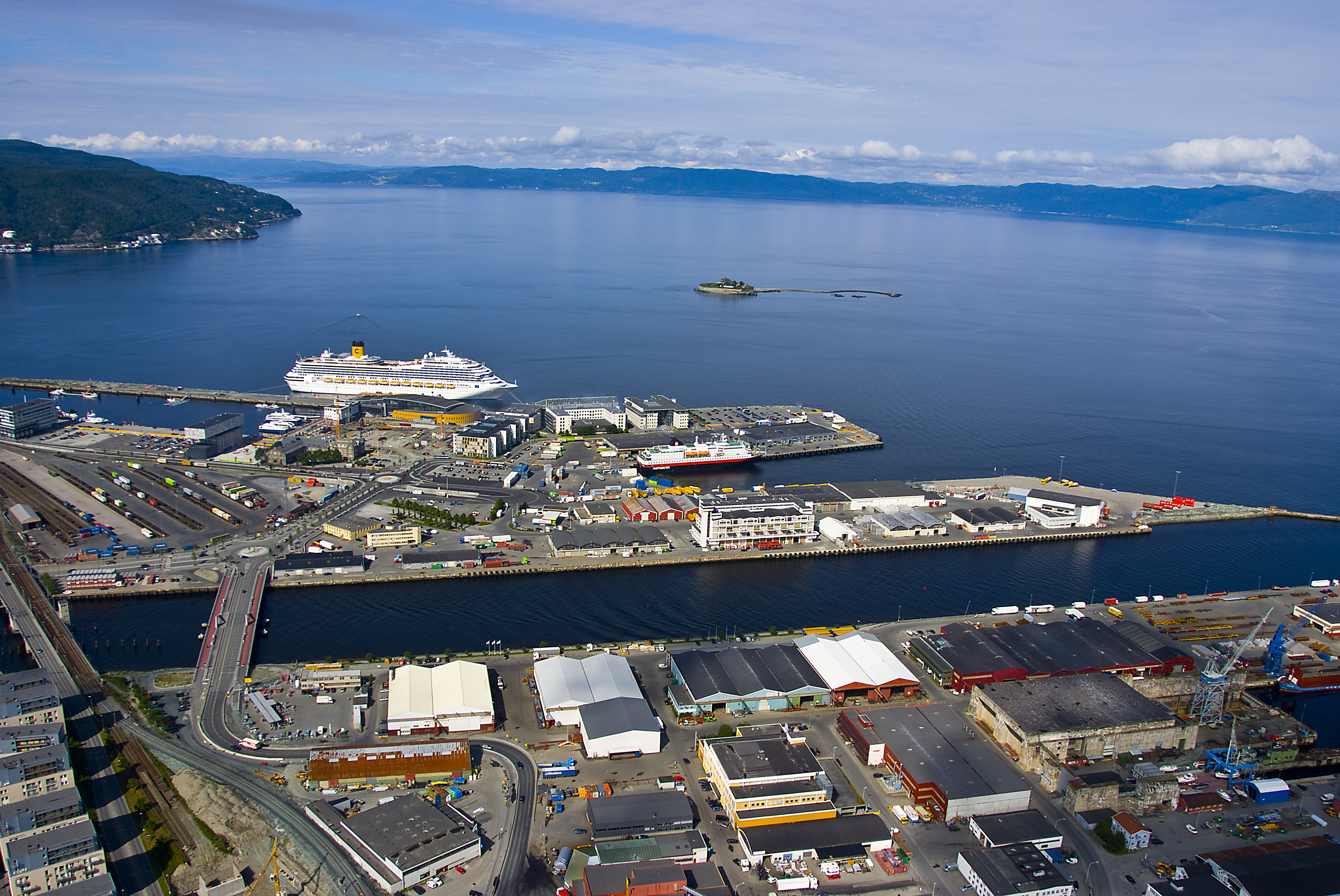 Foto: Trondheim Havn/Åge Hojem